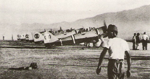 広州天河飛行場に展開する飛行第64戦隊第1中隊